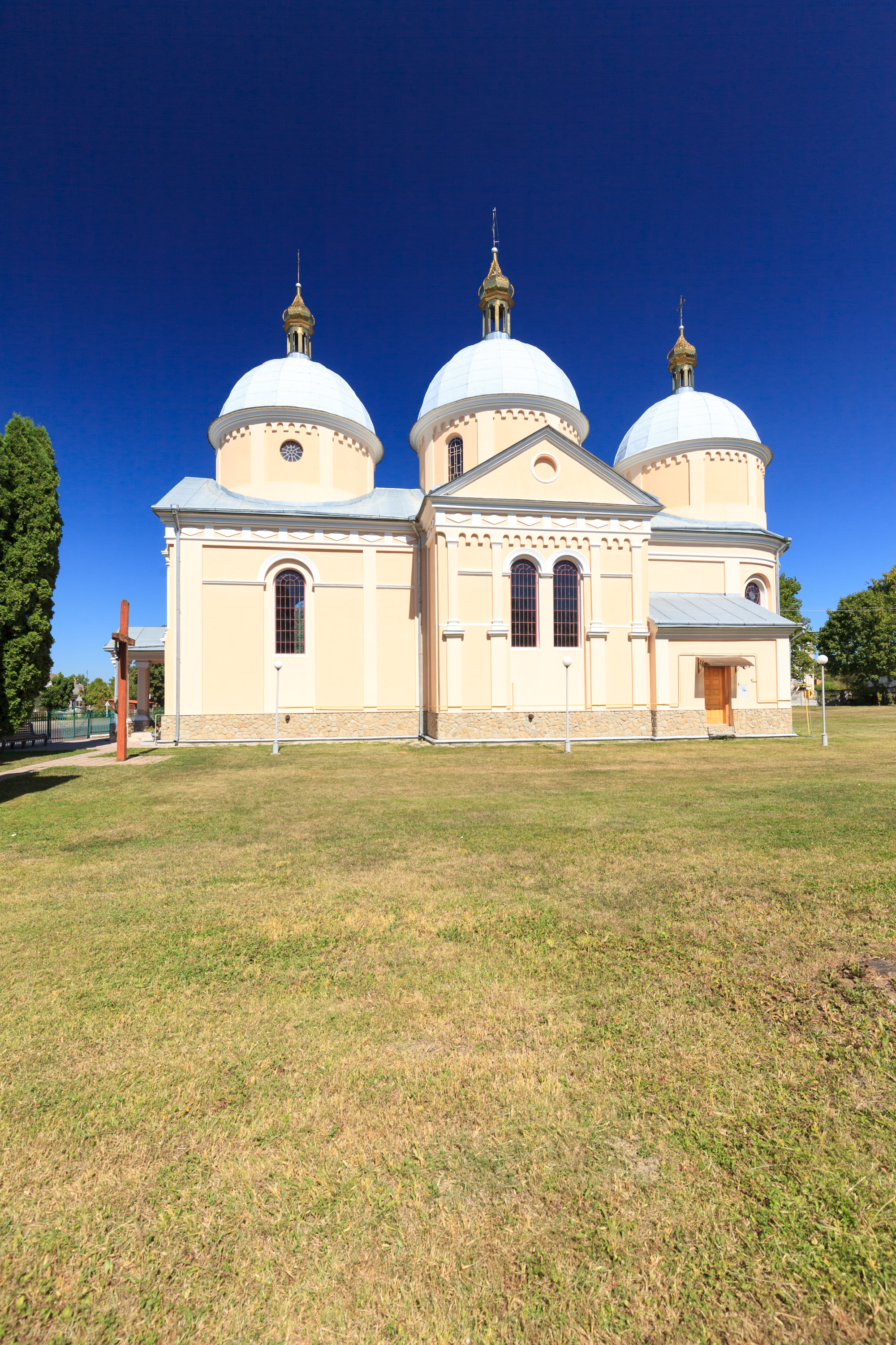 Церква Різдва Пресвятої Богородиці, Балучин, розташована в південно-західній частині села, на рівній ділянці, при дорозі на Глиняни Золочівського району